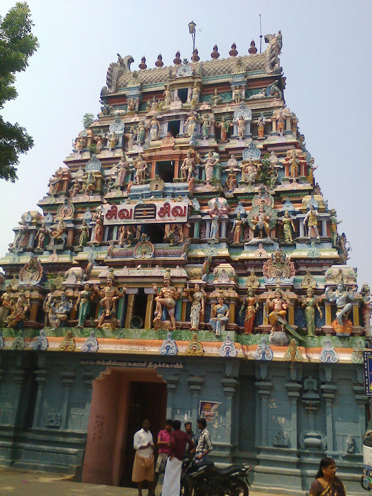 திருக்காட்டுப்பள்ளி அக்னீஸ்வரர் கோயில்